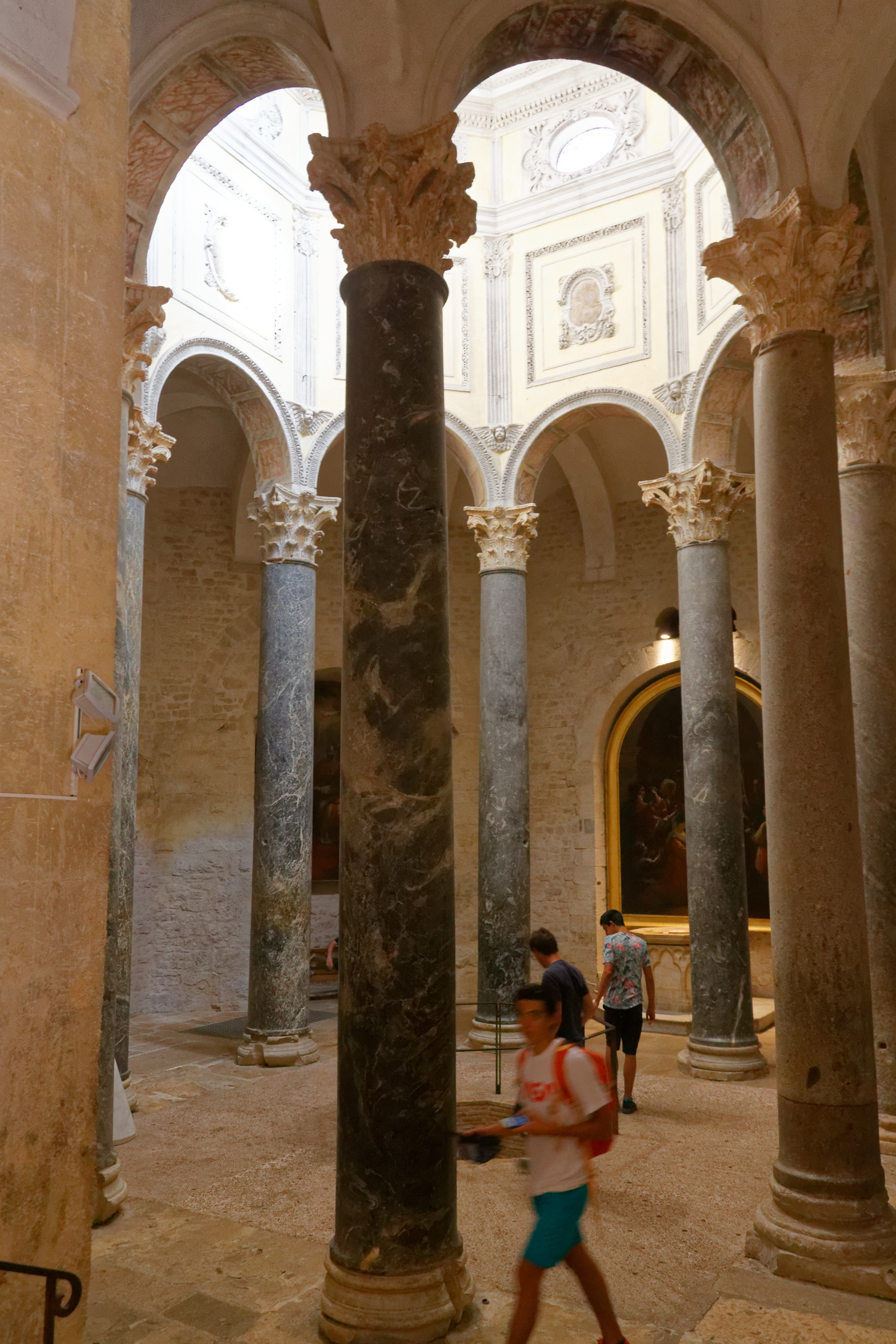 Taufkapelle in der Kathedrale Saint-Sauveur in Aix-en-Provence